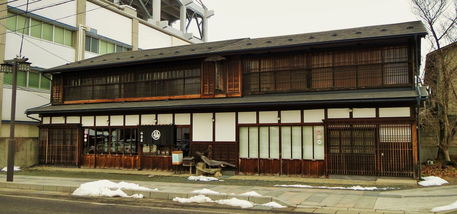 遠野市にある仙臺屋店舗兼主屋 Canon IXY 3